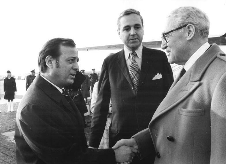 ADN-ZB Koard-5.12.74-gü-Berlin: USA-Botschafter eingetroffen- Der Außerordentliche und Bevollmächtigte Botschafter der USA in der DDR, John Sherman Cooper (r.), wurde am 3.12.74 bei seiner Ankunft auf dem Zentralflughafen Berlin vom Chef des Protokolls des DDR-Außenministeriums, Botschafter Franz Jahsnowski, begrüßt. Bildmitte: Brandon H. Grove jr., Botschaftsrat.